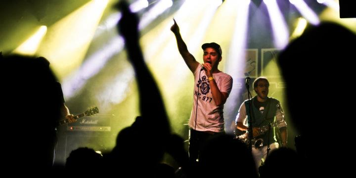 Sänger Thomas Eichmann an einem Konzert in der Schüür Luzern, Schweiz